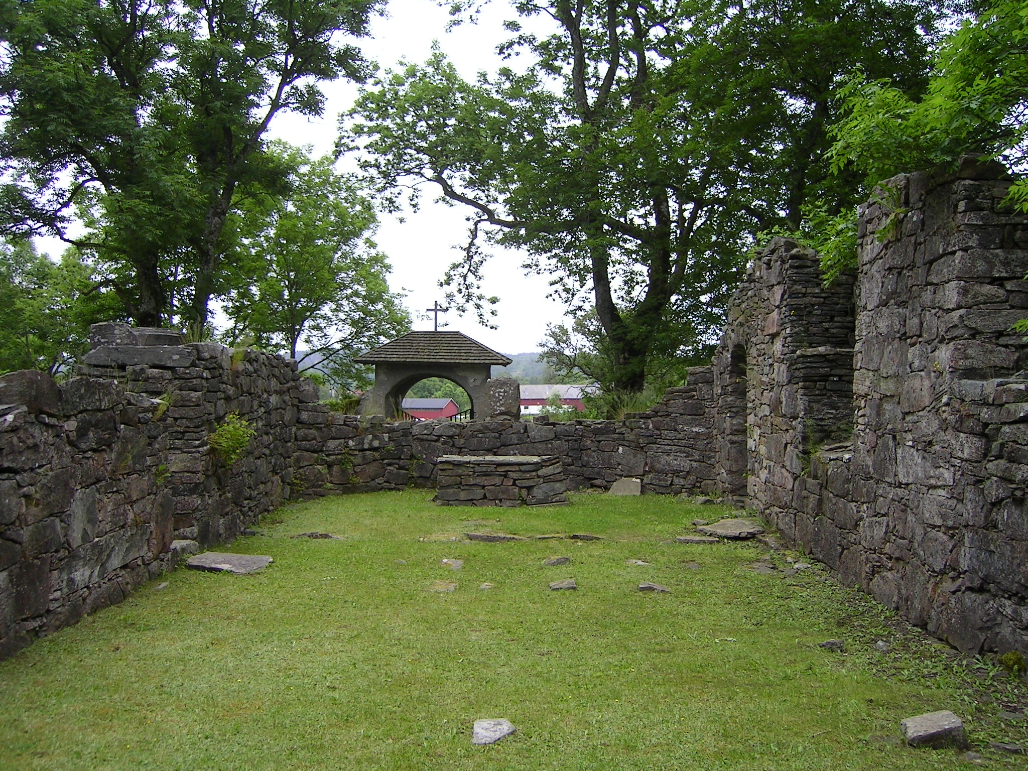 Ruinen efter Kungsäters gamla kyrka, Västergötland